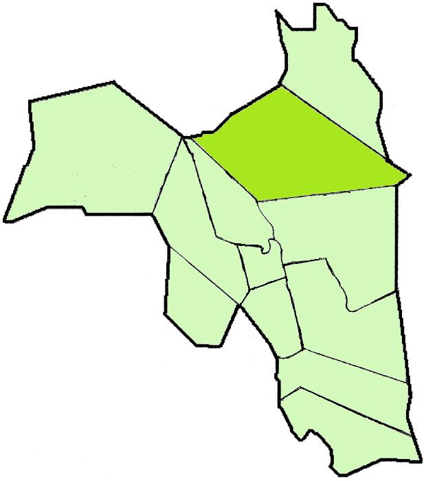 Lapinjärven kartta: Pukaron sijainti